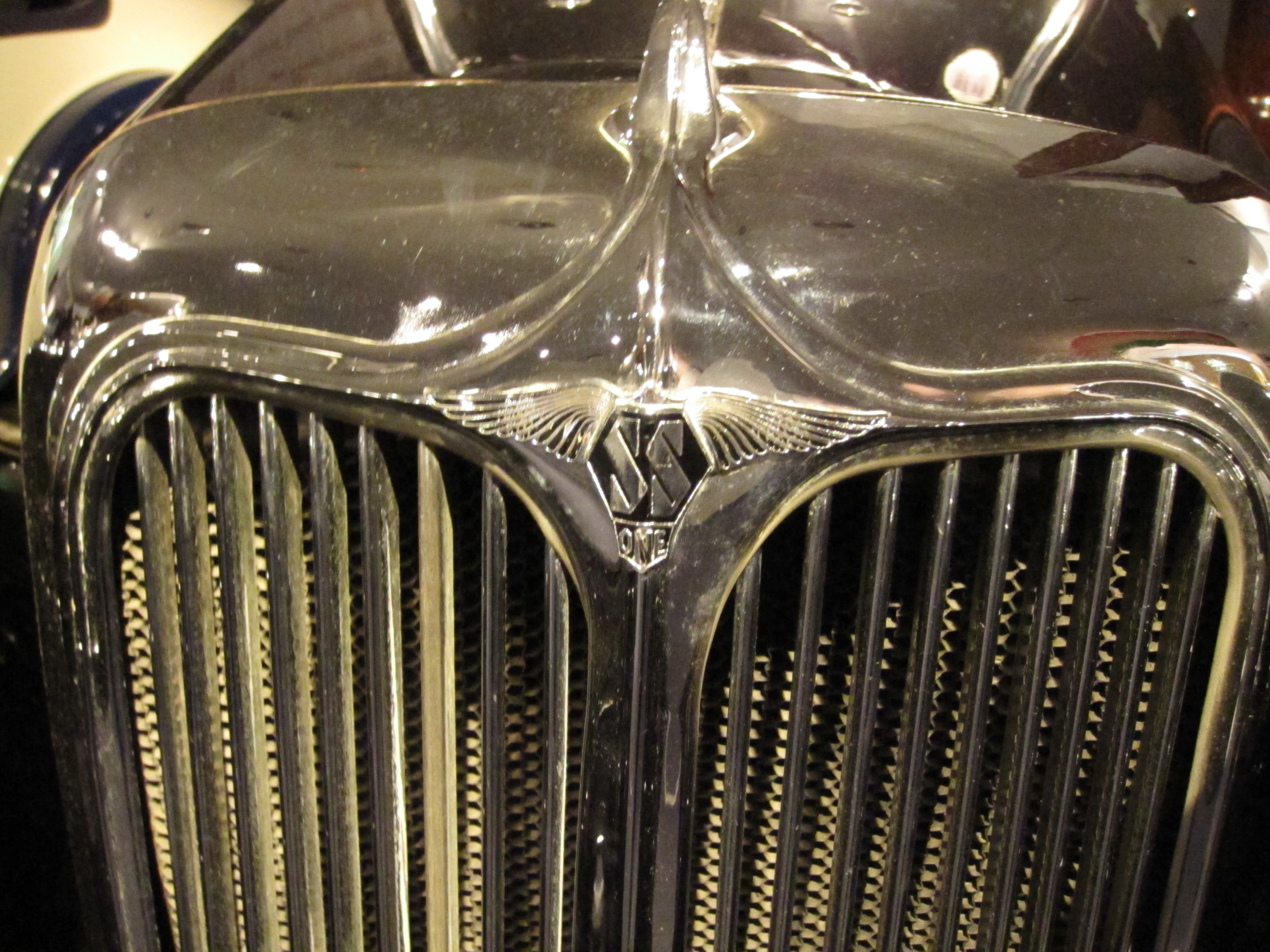 1933 SS 1 coupé (DVLA) Coventry Transport Museum